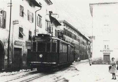 Tram fra Mezzolombardo e Borghetto nel 1955